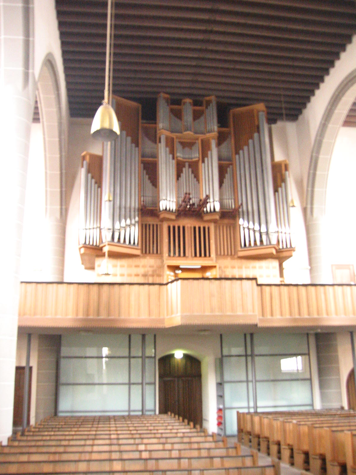 Darmstadt Stadtkirche, Blick auf die Orgel